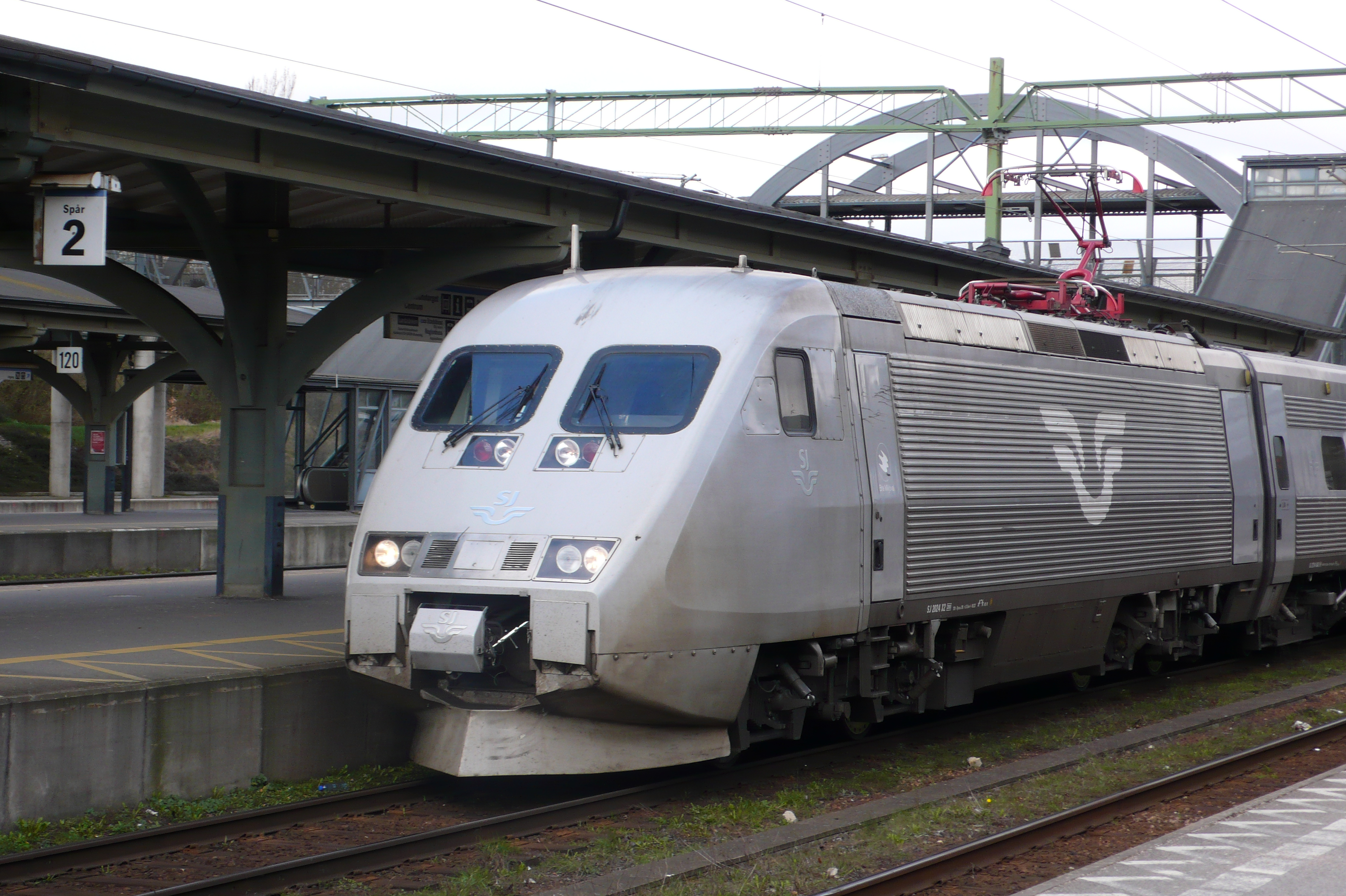 X2000 i Lund